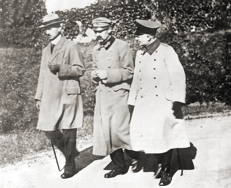 In Festungshaft in der Magdeburger Zitadelle, links der Legionsoberste von Sosnkowski und recht Oberleutnant Schlossmann.